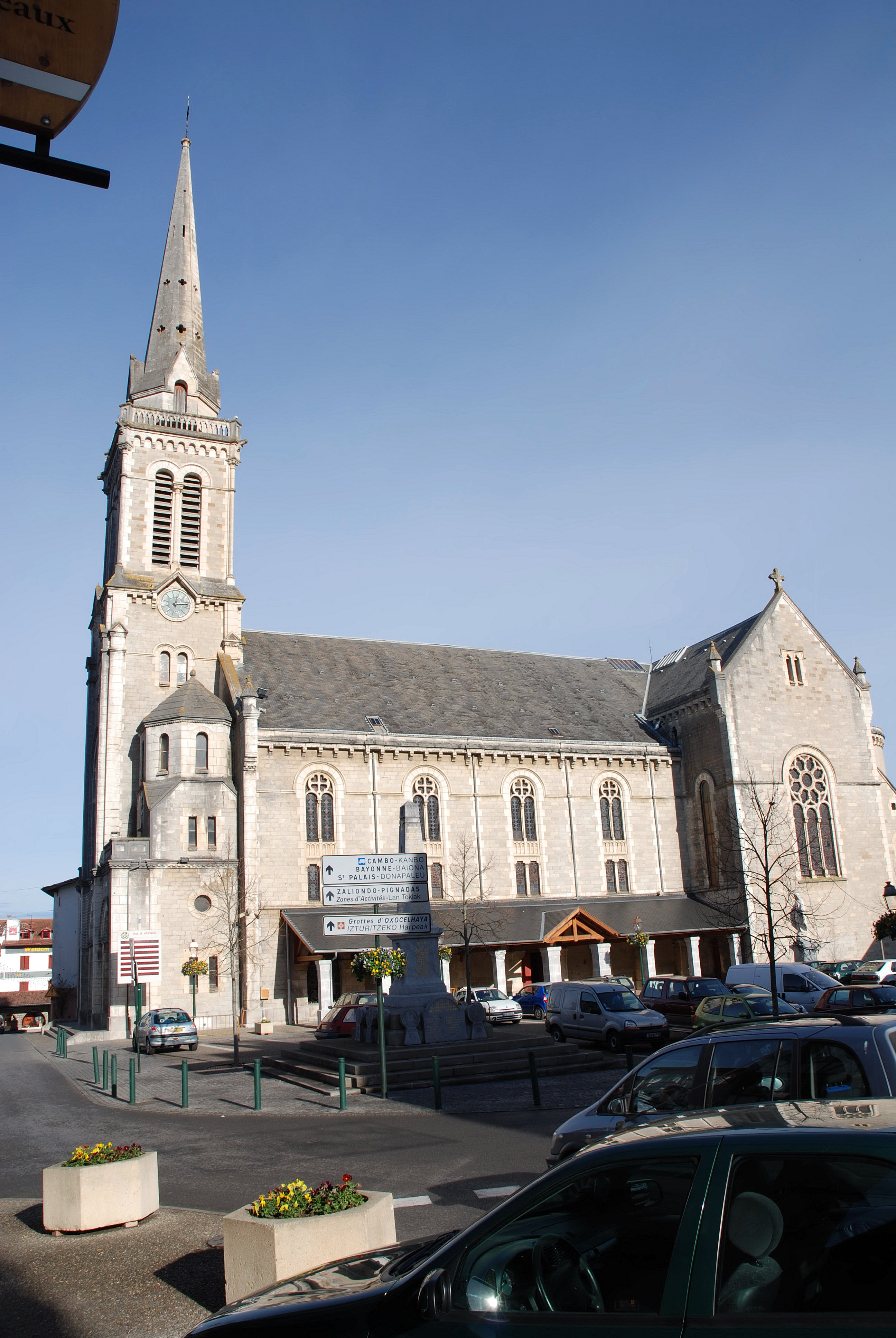 Hasparren, l'église Saint Jean Baptiste. Photo prise le 31/12/06 par Harrieta171